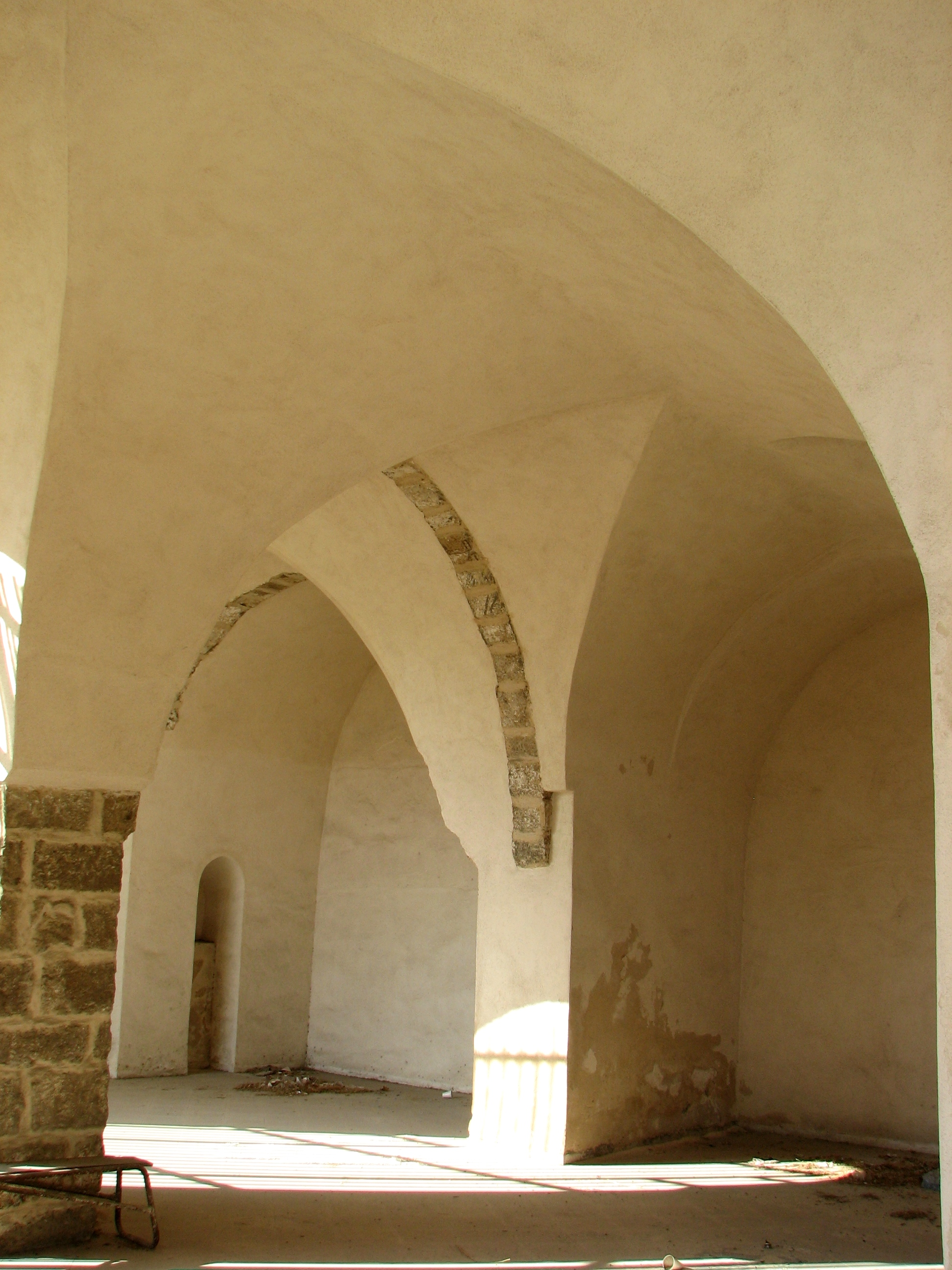 Al Zaghir Mosque, Downtwon Haifa. Was built in the 18th century. מסגד אל-זע'יר בעיר התחתית בחיפה. המסגד נבנה במאה ה-18 בימיו של דאהר אל-עומר בעיר התחתית בחיפה המסגד מפנים